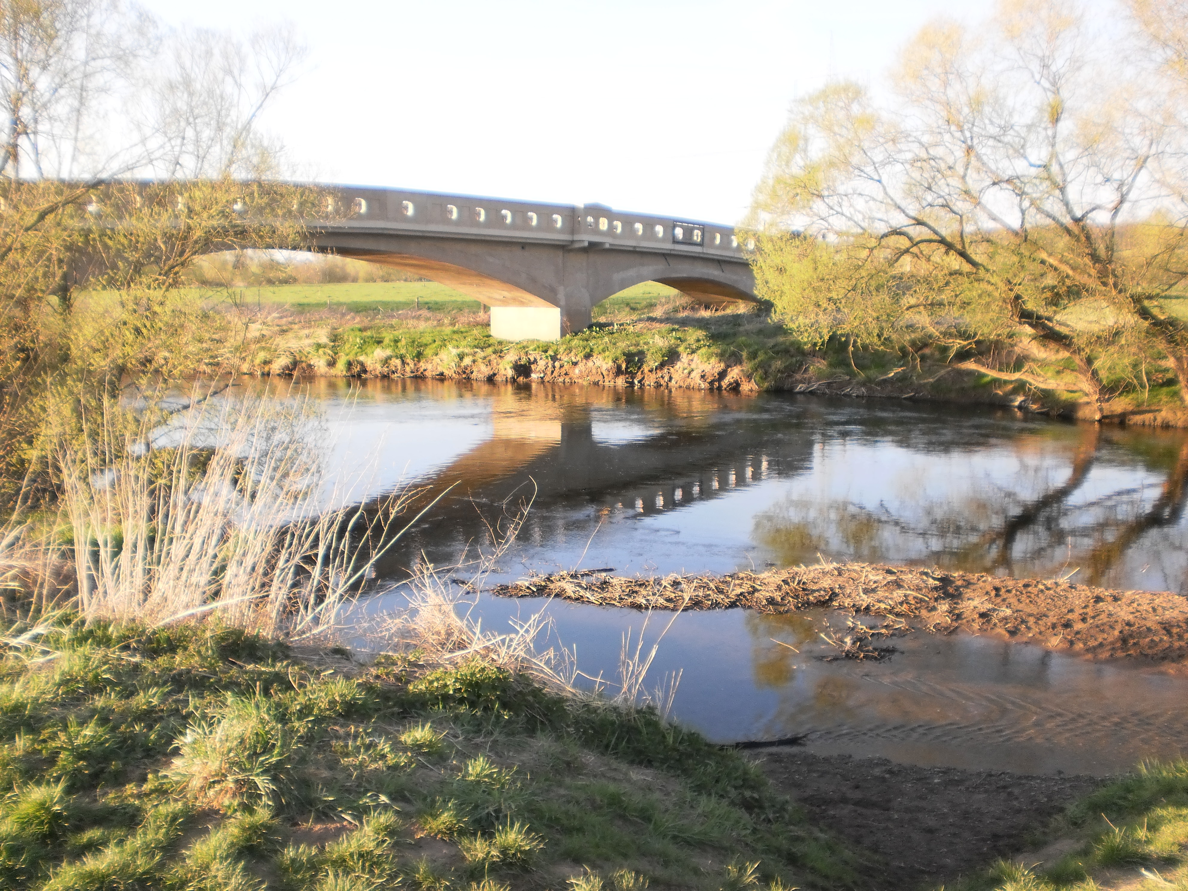 Der Fluss Lahn und die 2012 erneuerte "Alte Lahnbrücke" am Ortsrand von Sichertshausen, von Südwesten her gesehen. Über diese bei Hochwasser nicht immer befahrbare Brücke verläuft sowohl der Lahntalradweg als auch die örtliche Radroute "Lange Hessen" vom Bahnhof im Hauptort Fronhausen über die Ortsteile Sichertshausen, Hassenhausen und Erbenhausen nach Amöneburg.